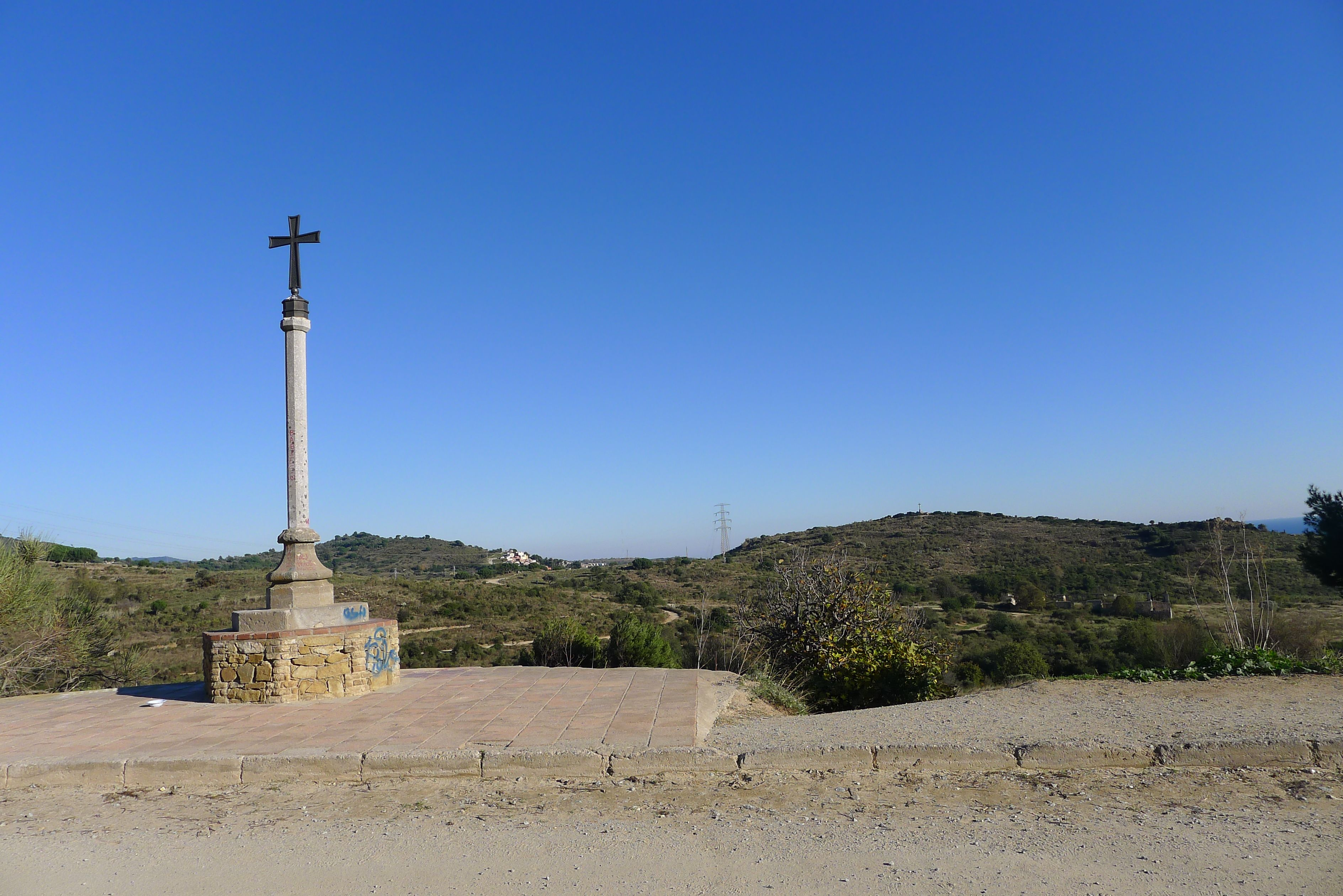 Vista bajando hacia Montigalà desde Sant Jeroni de la Murtra